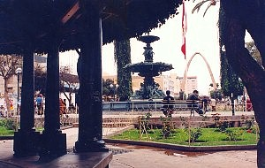 Claro oscuro tomada desde la glorieta hacia la pileta y el arco parabolico